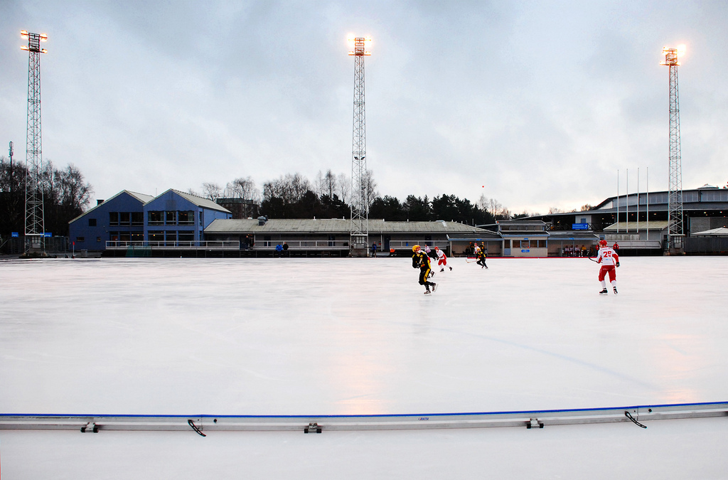 Ruddalens IP. Heden möter Oskarström BK i bandy.